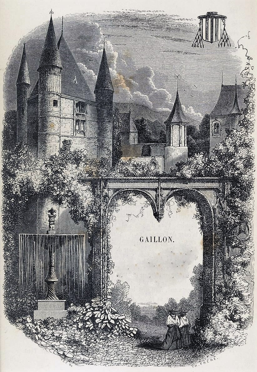 Château de Gaillon - vue d'artiste - illustration de Charles-Théodore Frère